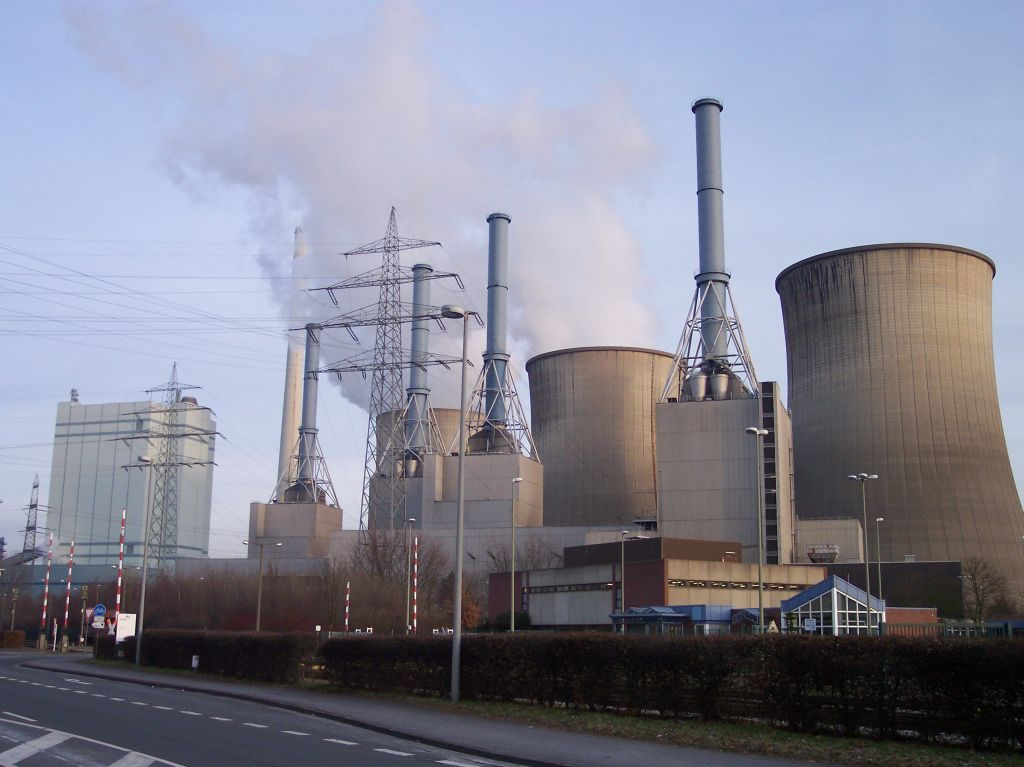 Gersteinwerk, Werne-Stockum